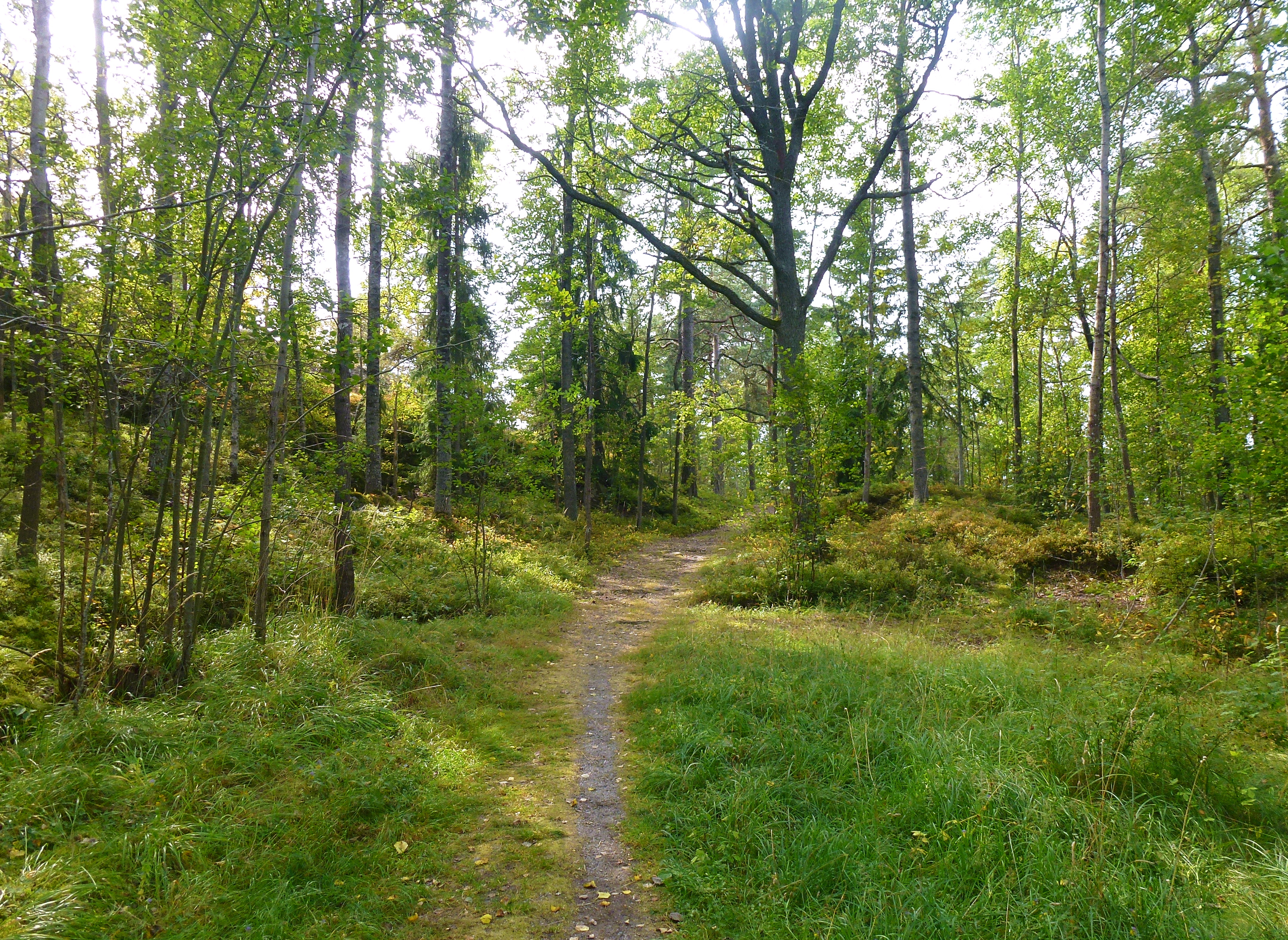 Tollare naturreservat, promenadstig